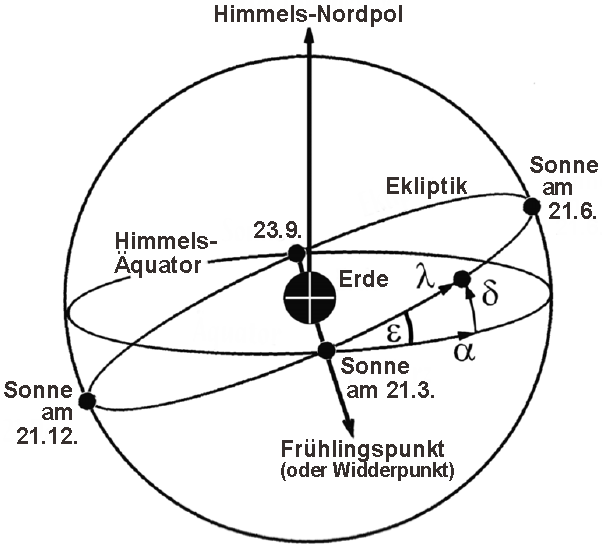 Beschreibung: Ekliptikschiefe, Himmelskoordinaten